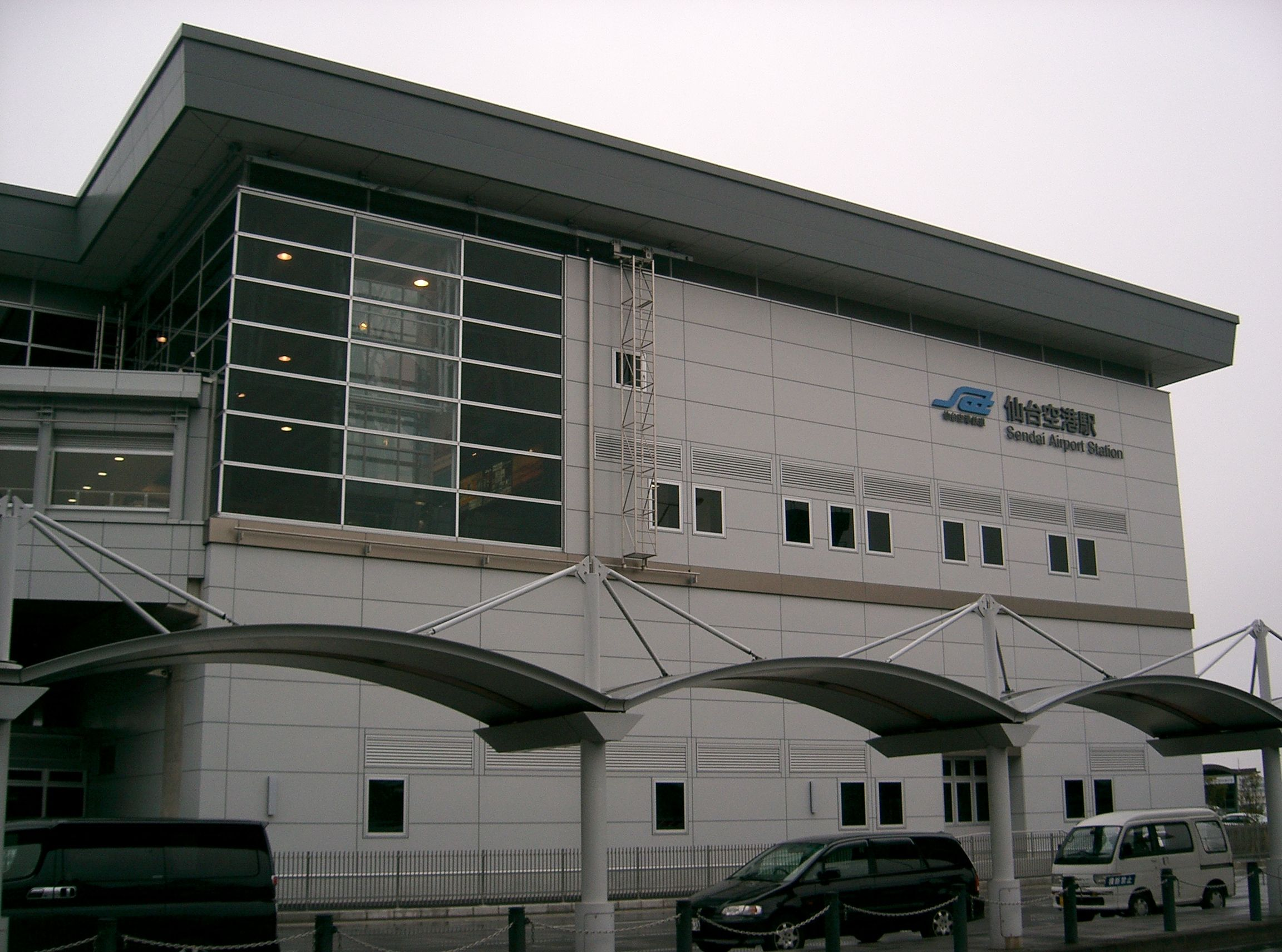 仙台空港駅